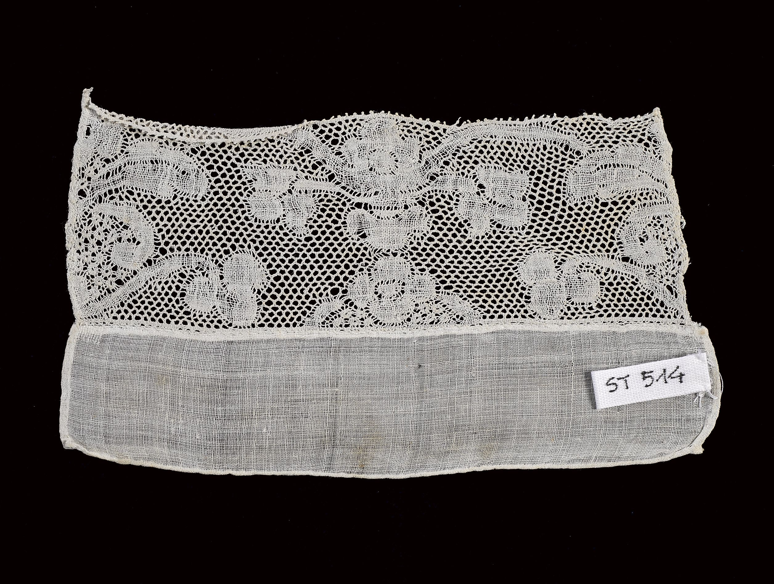 Lace-Bobbin Lace